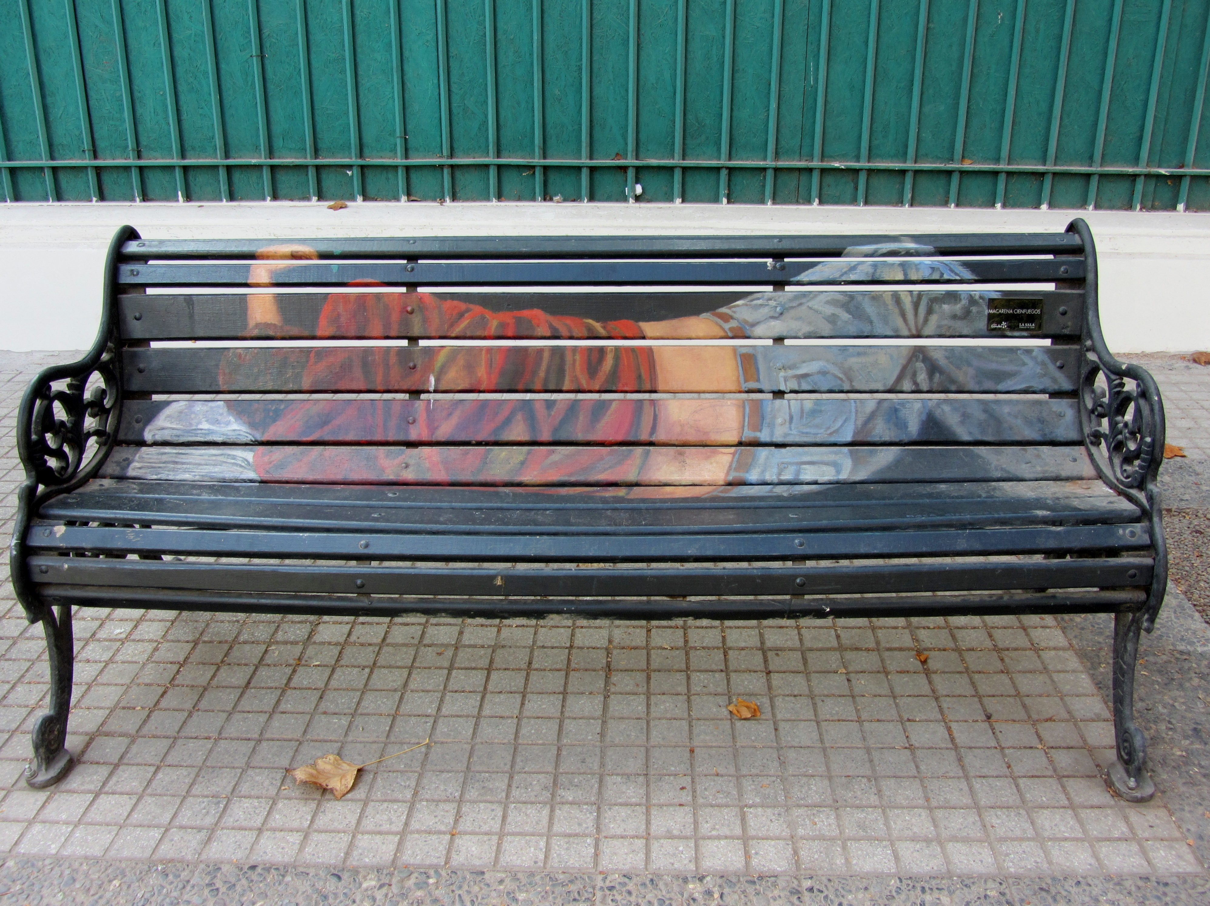 Banca pintada en avenida Isidora Goyenechea, Las Condes